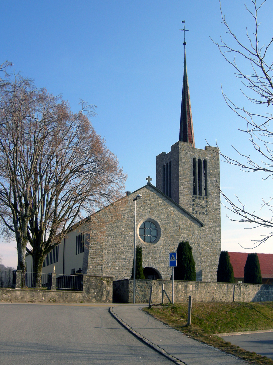 Mézières, église paroissiale